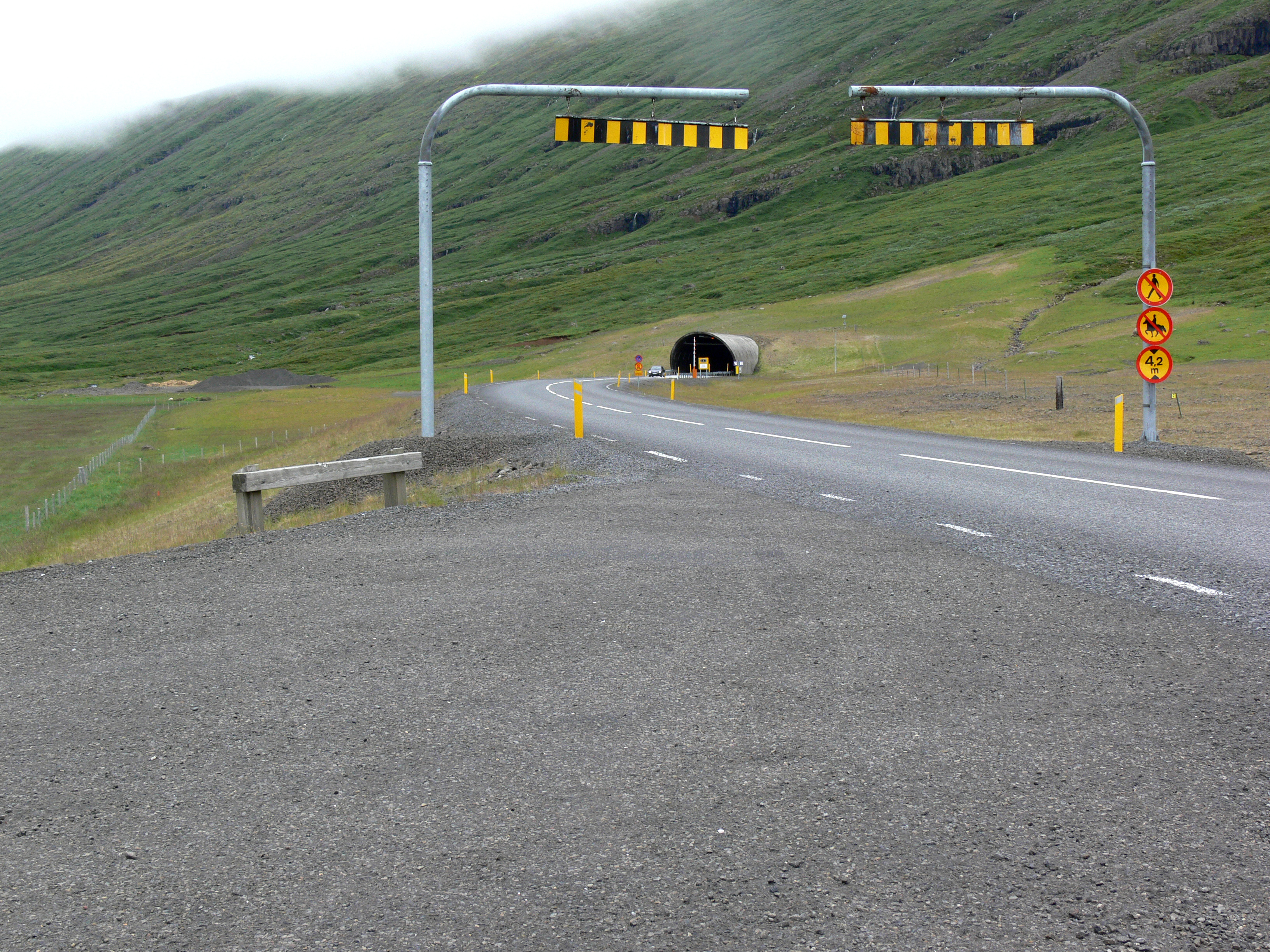 Tunnel bei Dalir, der Fáskrúðsfjörður mit Reyðarfjörður verbindet.